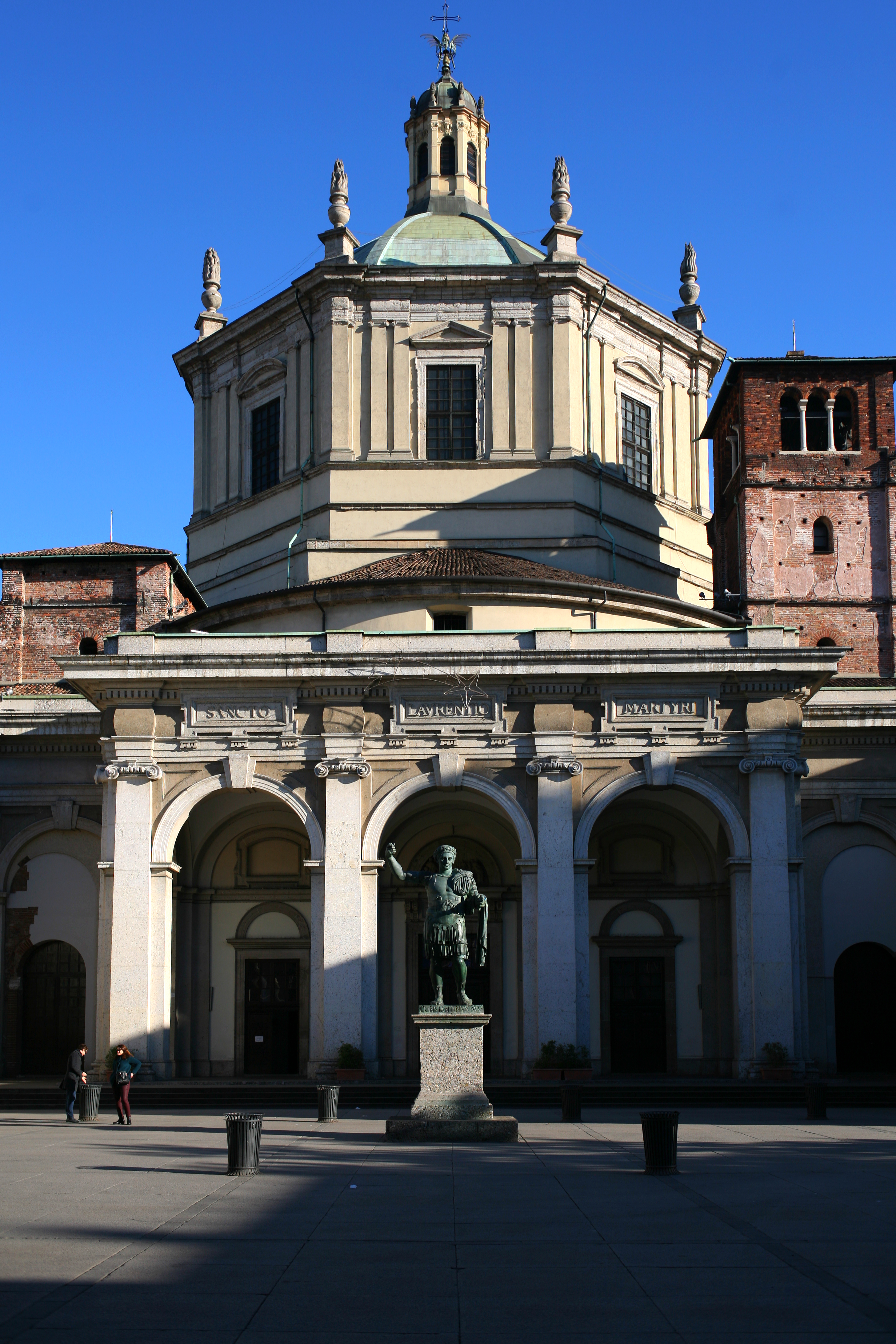 San Lorenzo, Milano, veduta della facciata